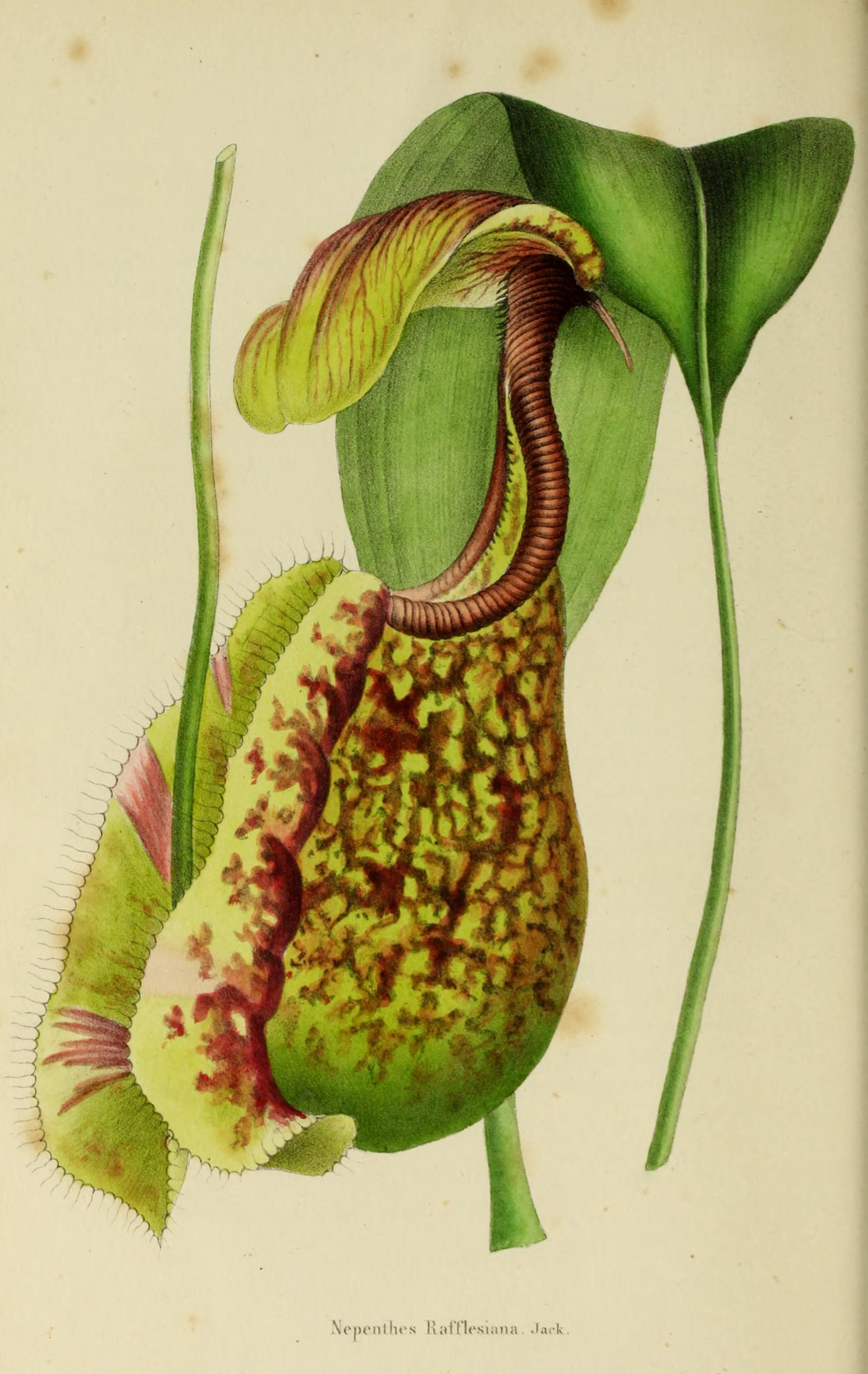 Annales de la Société royale d'agriculture et de botanique de Gand : journal d'horticulture et des sciences accessoires.